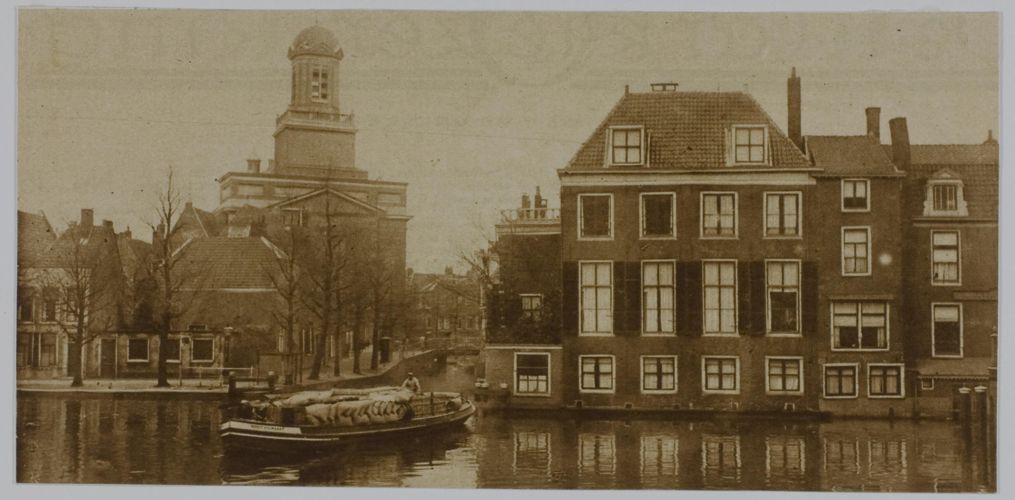 Gezicht op de Stille Mare, gezien van de Aalmarkt met rechts Huis ter Lucht en links de Stille Rijn met op de achtergrond de Hartebrugkerk. Schip op de voorgrond. Circa 1925.